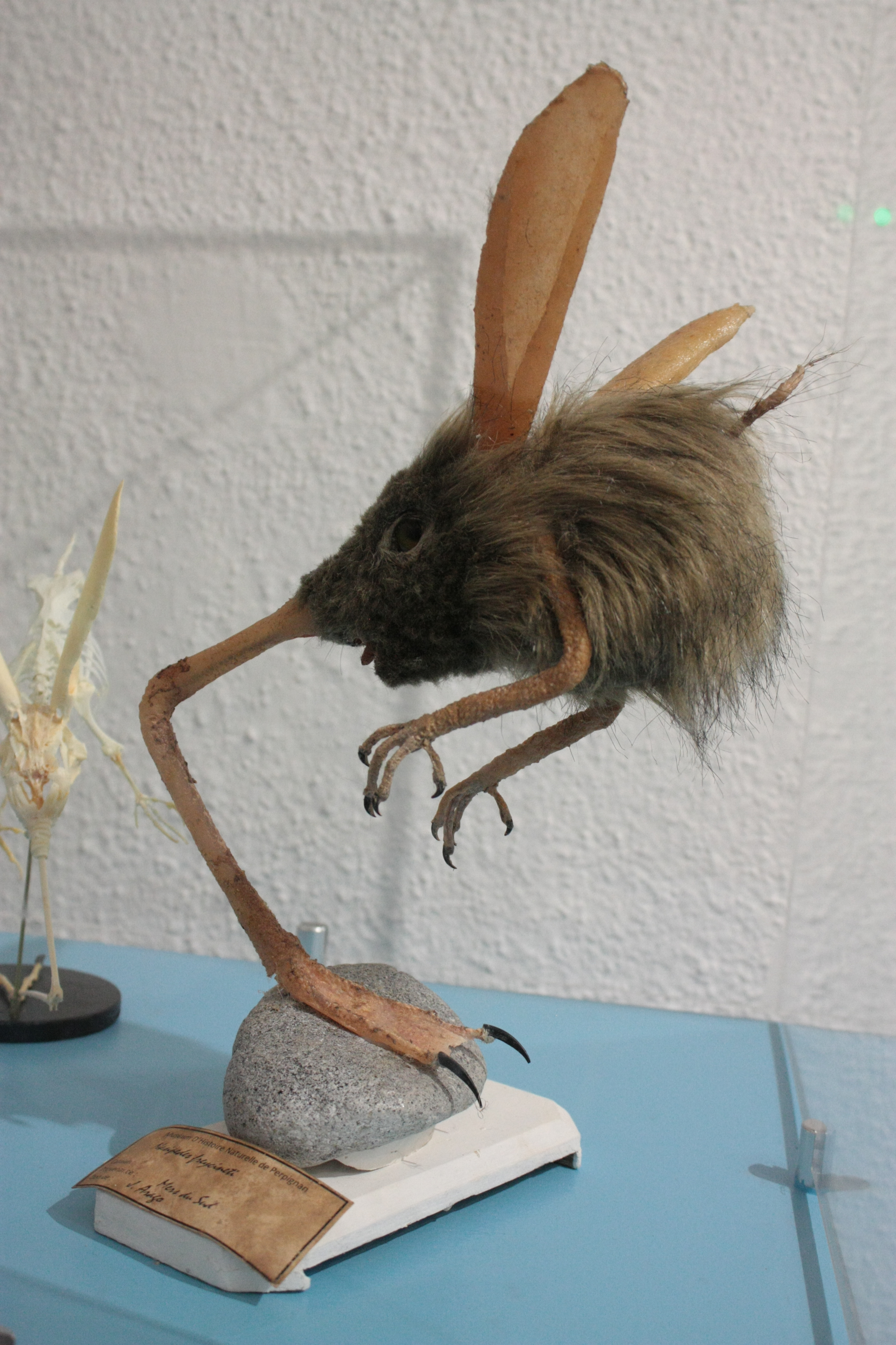 Otopteryx volitans reconstitué au Muséum d'histoire naturelle de Perpignan (2018)